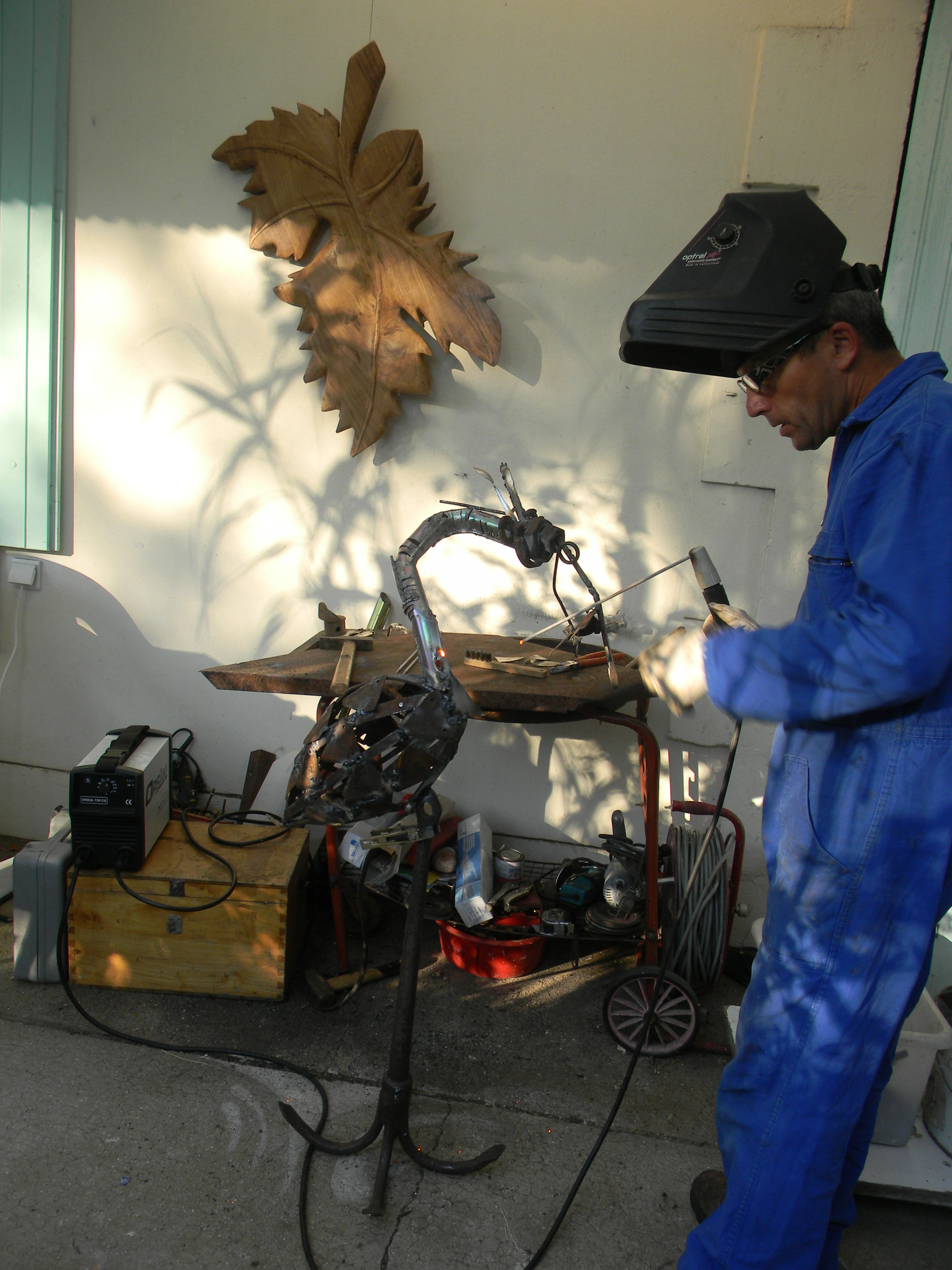 Alain Nouraud dans son atelier 2011